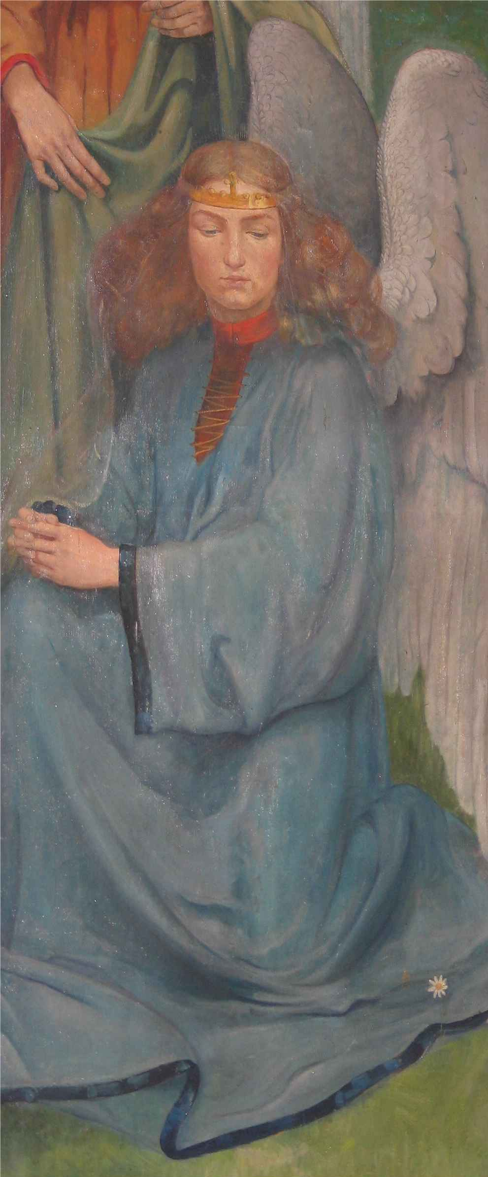 Auschnëtt aus der Wandmolerei vum Dominique Lang (1874-1919) d'Daf vu Christus an der Kierch zu Jonglënster.